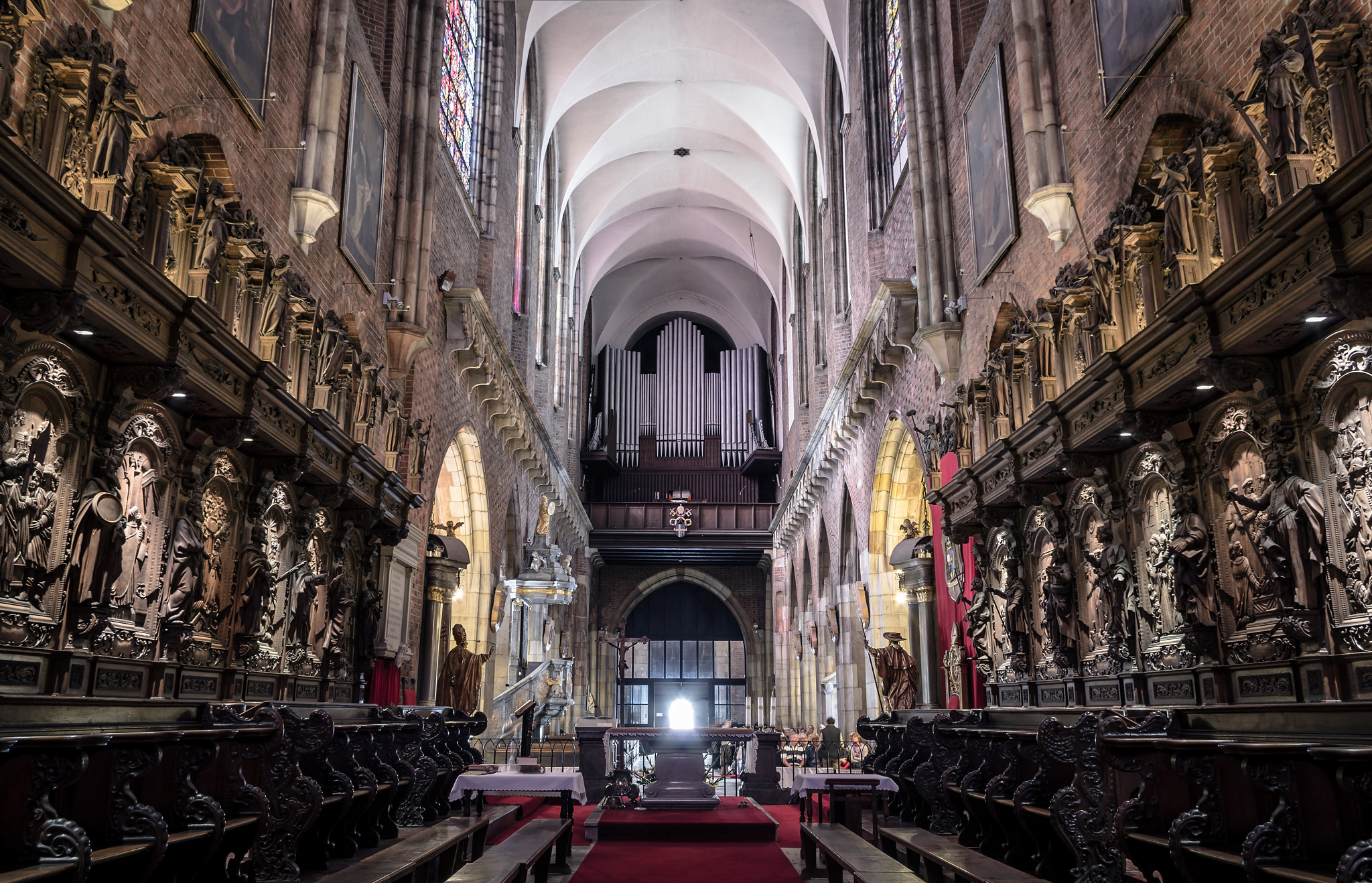 Katedra św. Jana Chrzciciela we Wrocławiu - widok w kierunku wejścia głównego